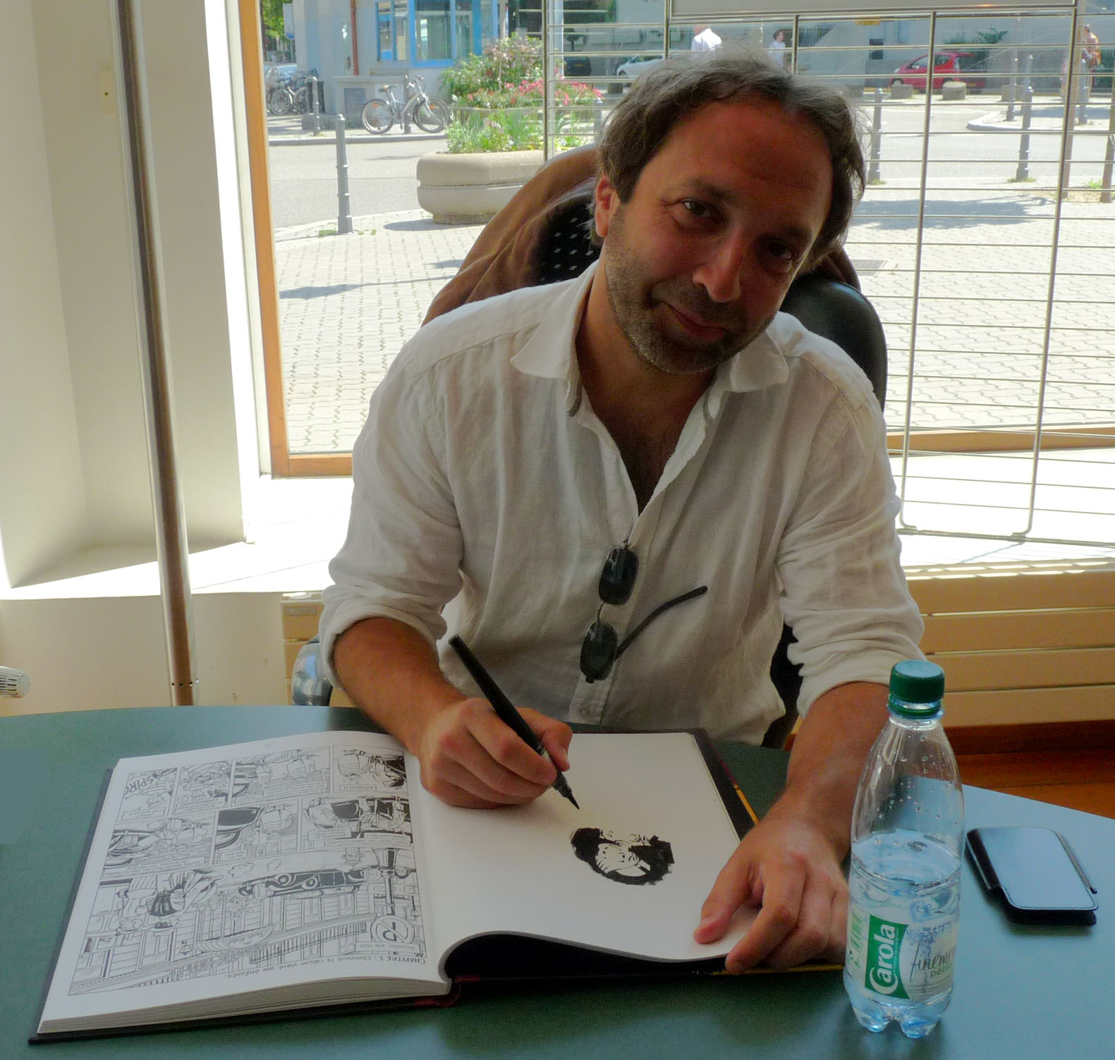 Emile Bravo au Festival européen de la bande dessinée Strasbulles 2009